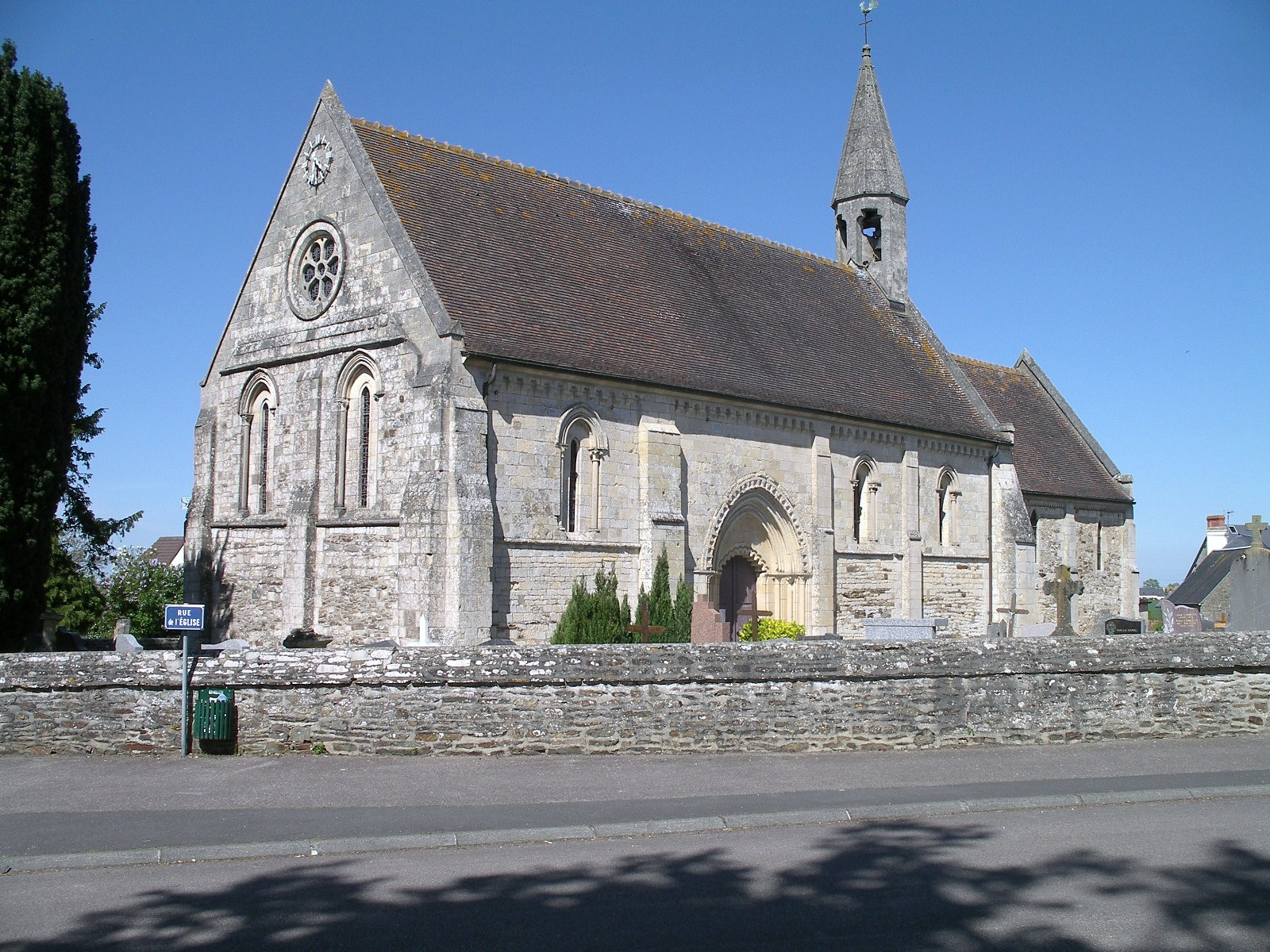 Eglise Saint-Pierre à Bougy (Calvados)